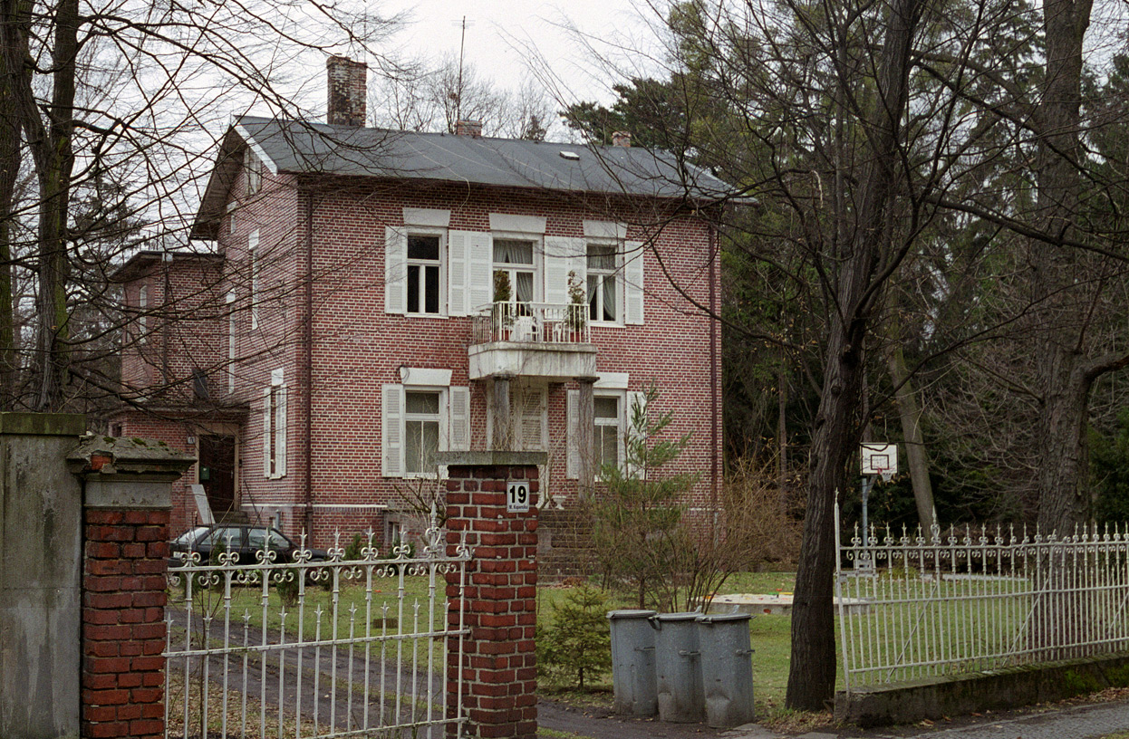 Max-Berg-Haus, Kopernikusstraße, Breslau (heute Wrocław), Niederschlesien, Polen.